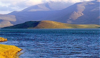 Spandaryan reservoir in Sisian.